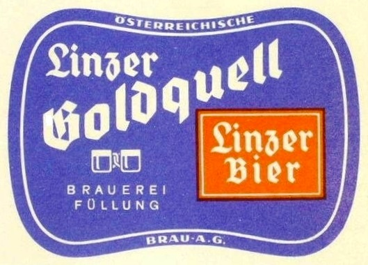 Bieretikett Linzer Bier - Linzer Goldquell (Brau AG)